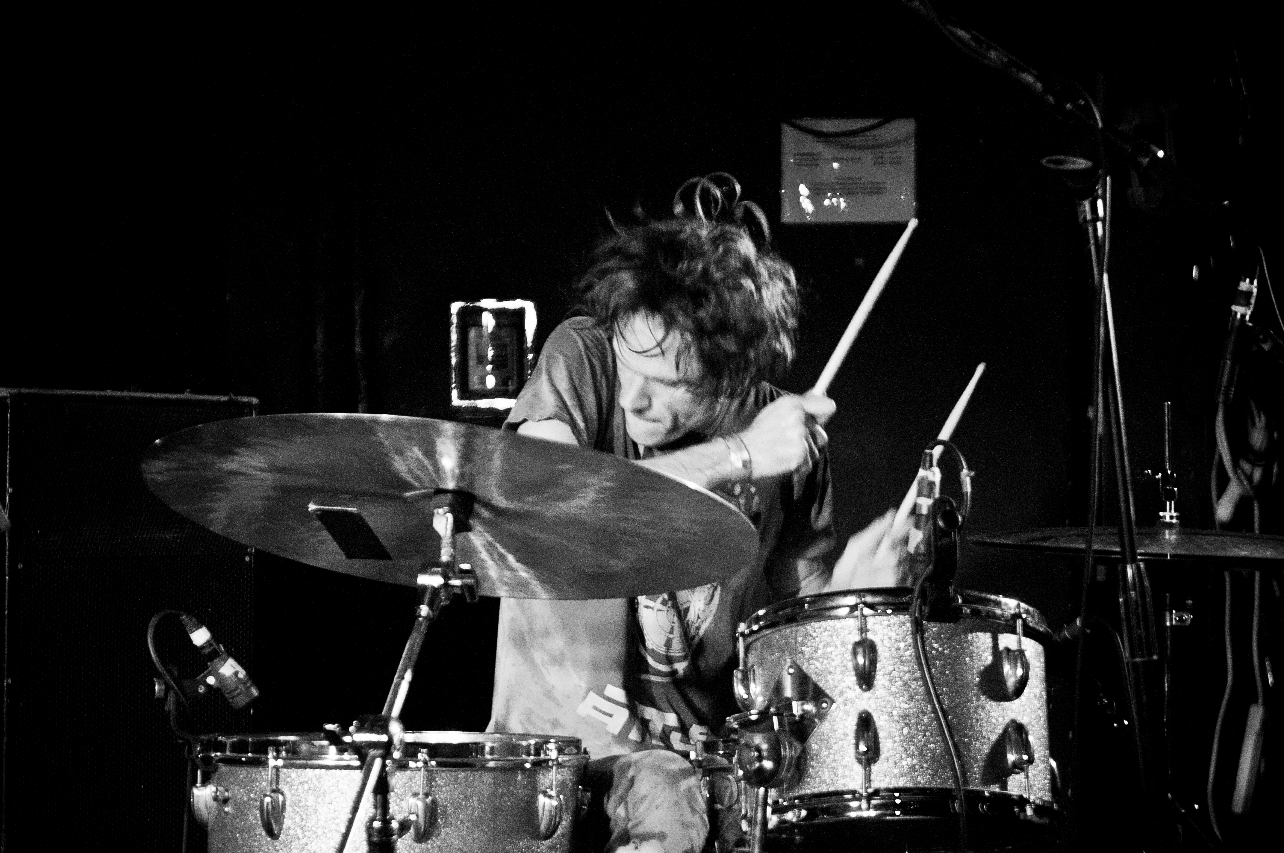 DEERHOOF 2/10/11